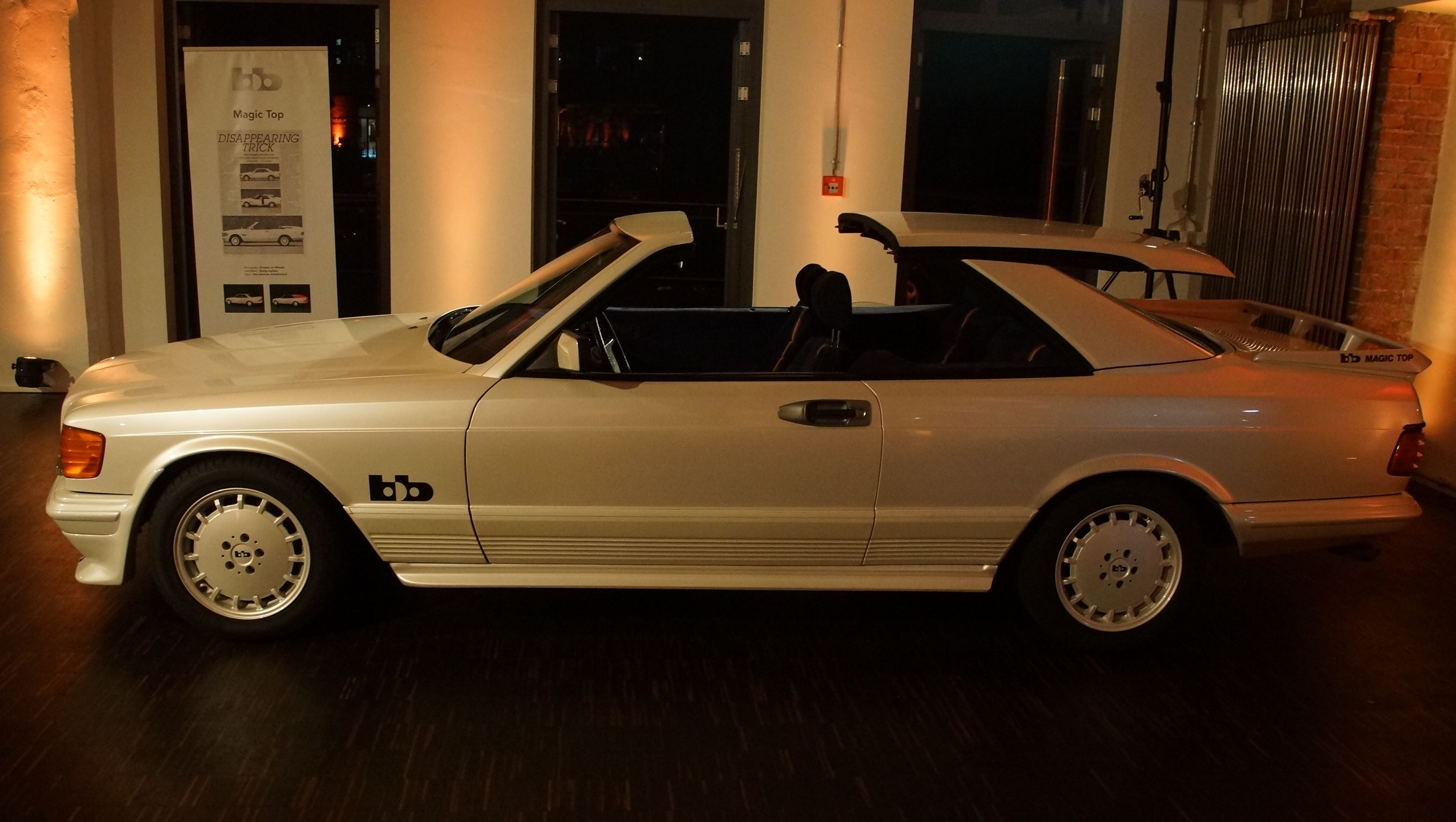 bb Magic Top Mercedes bei der Enthüllung des bb Moonracer in der Klassikstadt Frankfurt am 20.-21. September 2014